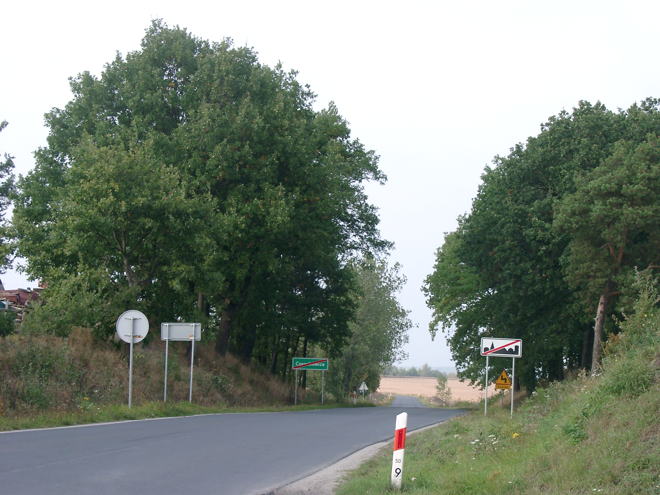 Czernikowice koło Chojnowa Czernikowice near Chojnów